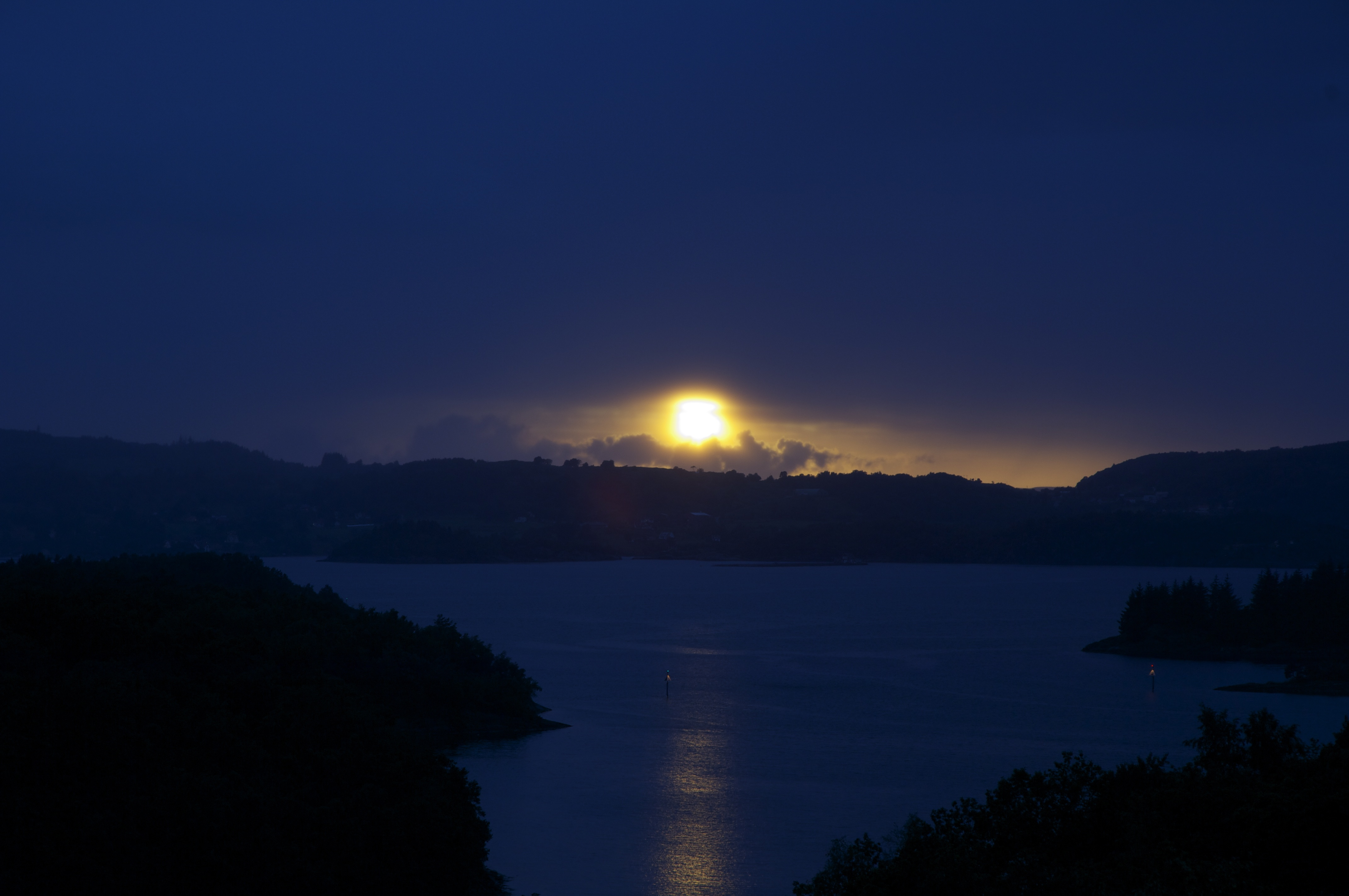 Sunset over Finnøy 4